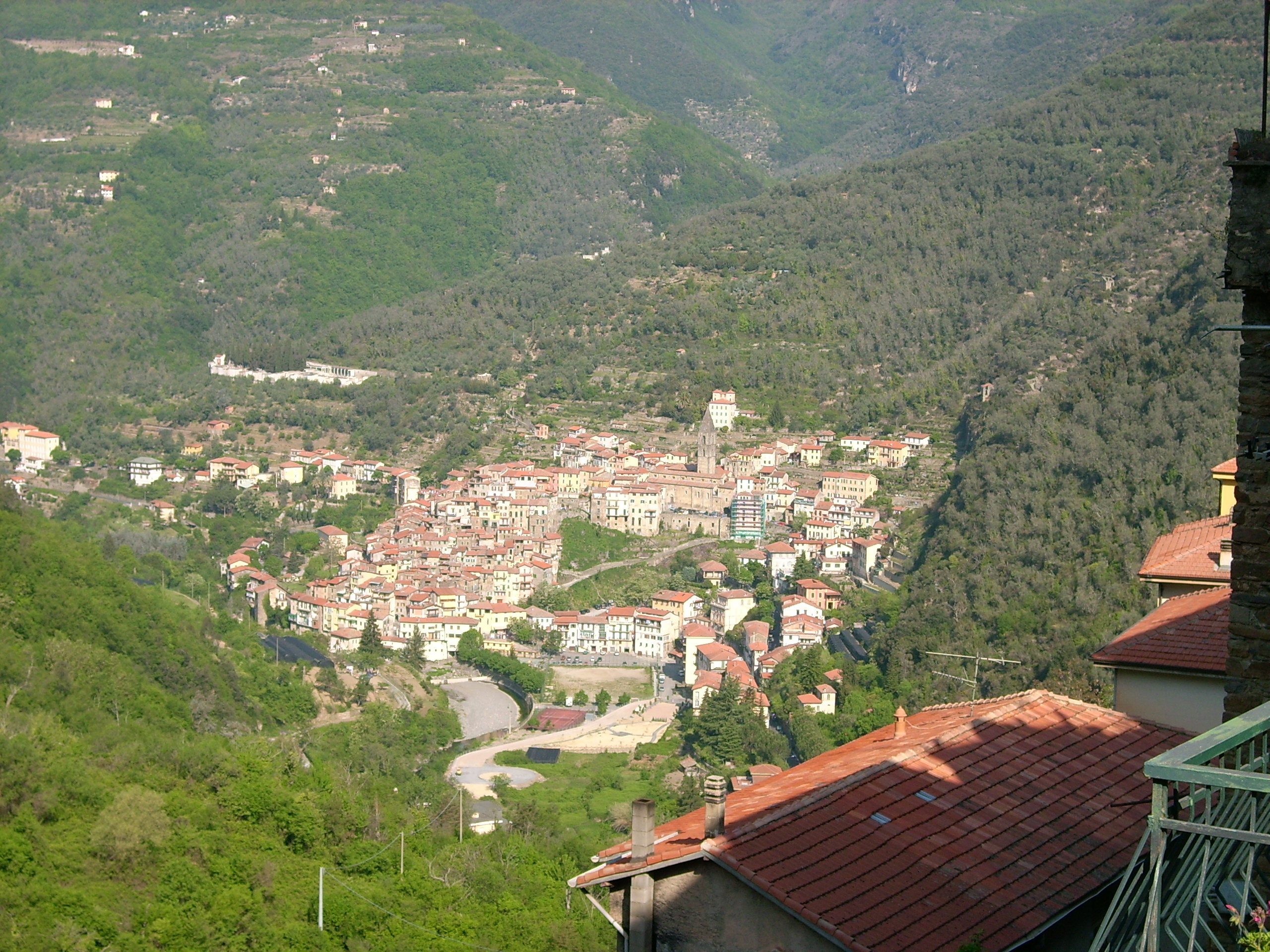 Pigna (IM), Liguria, Italia